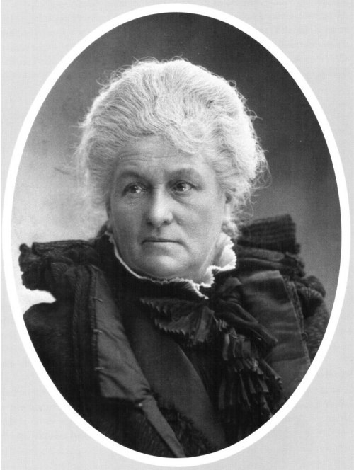 Portrait de Alice Hoschedé Monet